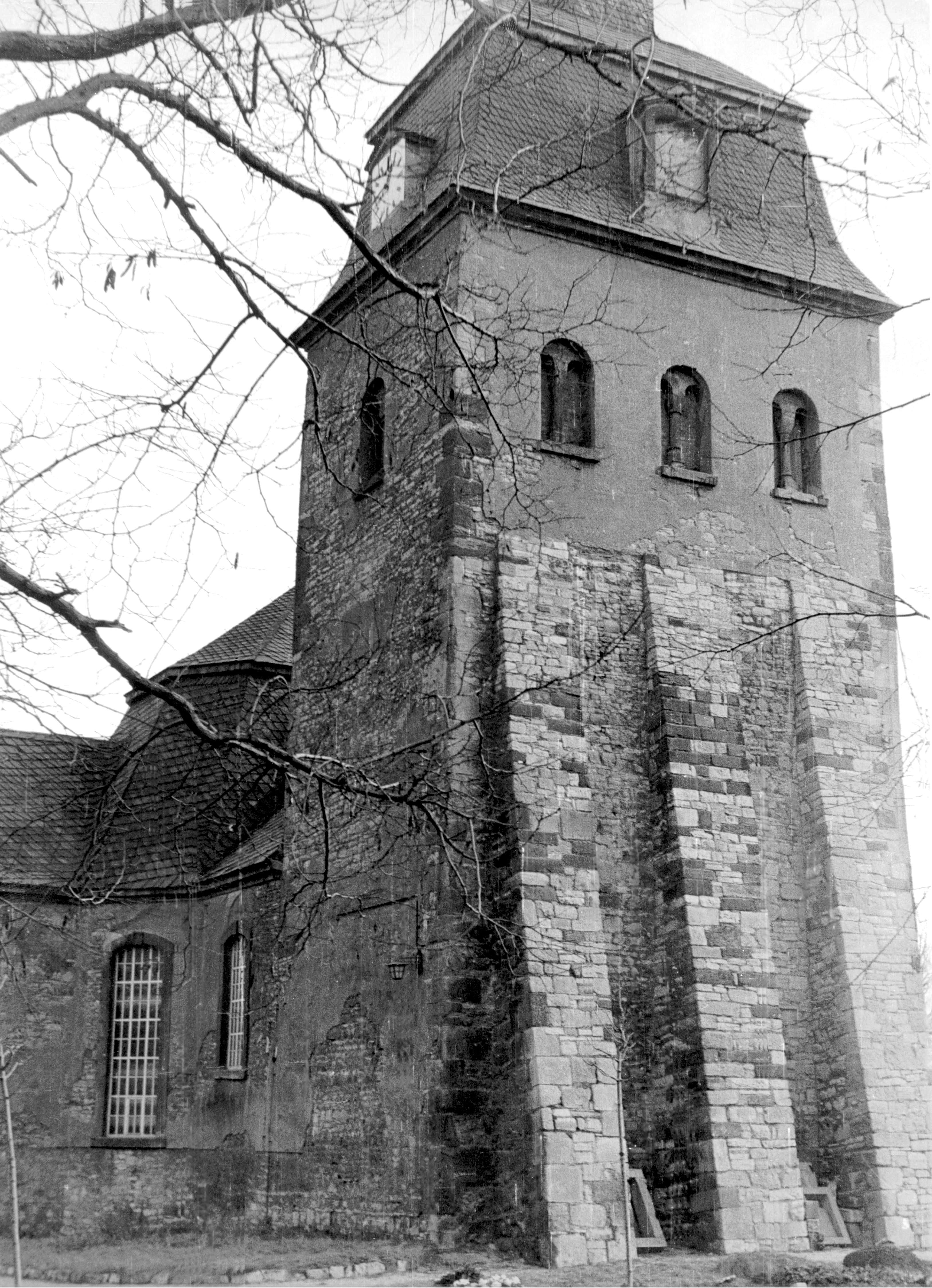 12.01.1969 4206 Krumpa: Dorfkirche (GMP: 51.204632,11.845932), erbaut ab 1751. [19681231A]19690112350AR.JPG(c)Blobelt